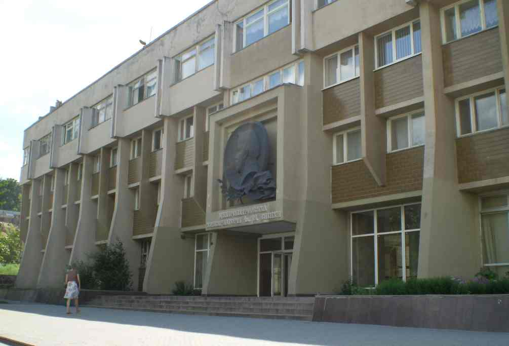 Дніпропетровська консерваторія Dnipropetrovsk conservatorie